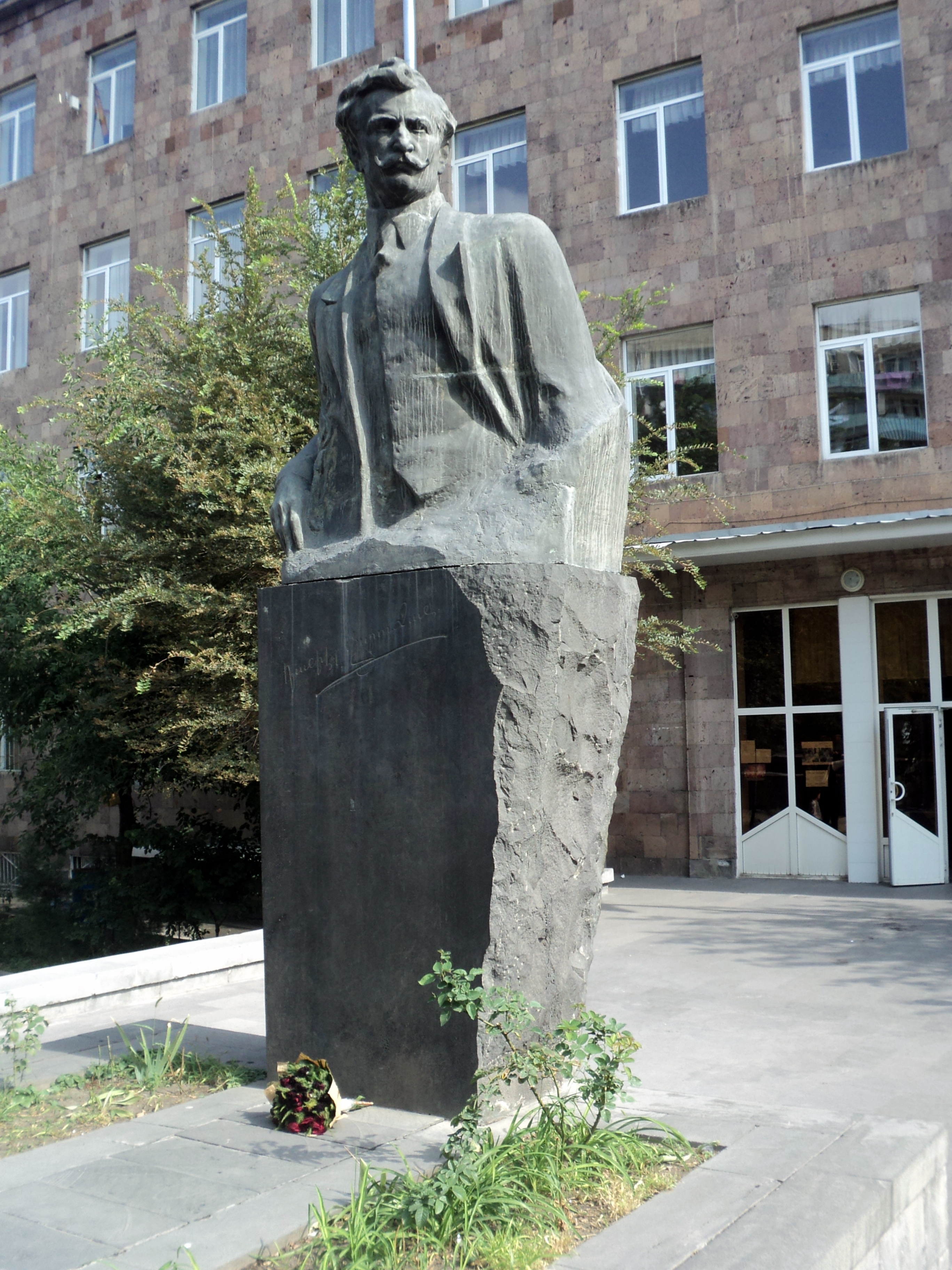 Դանիել Վարուժանի կիսանդրին նրա անվան դպրոցի առջև Քանդակագործ` Թորգոմ Չորեքչյան, 1972 թ. 7/6